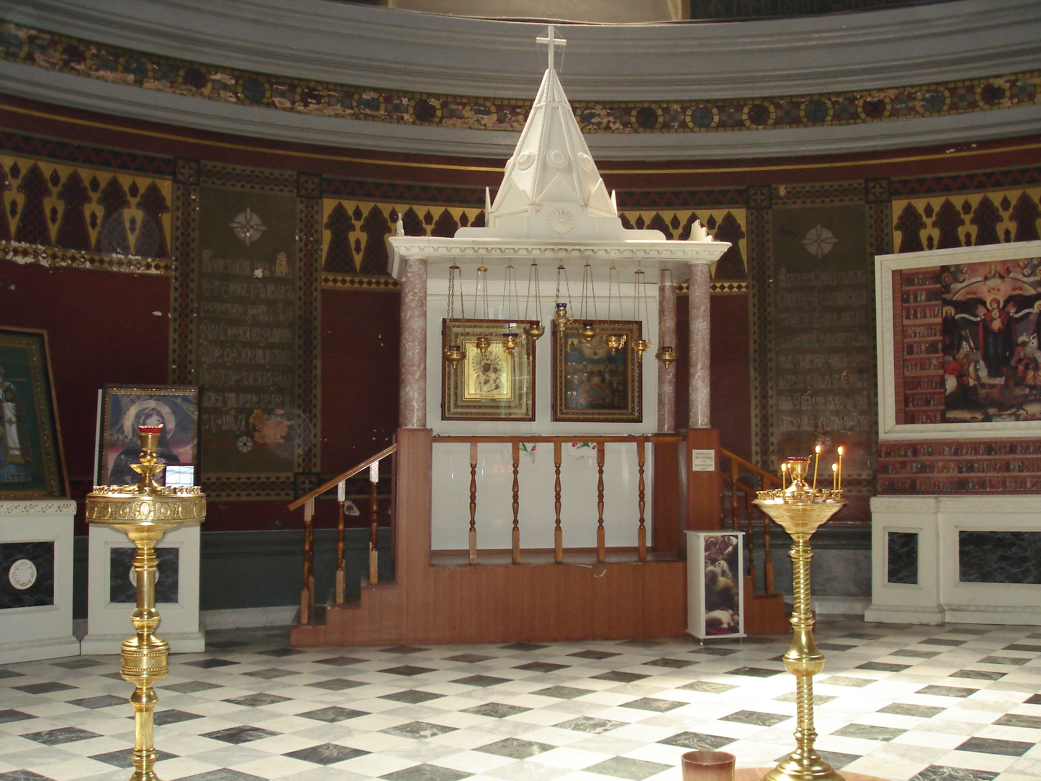 Интерьер в Новочеркасском соборе